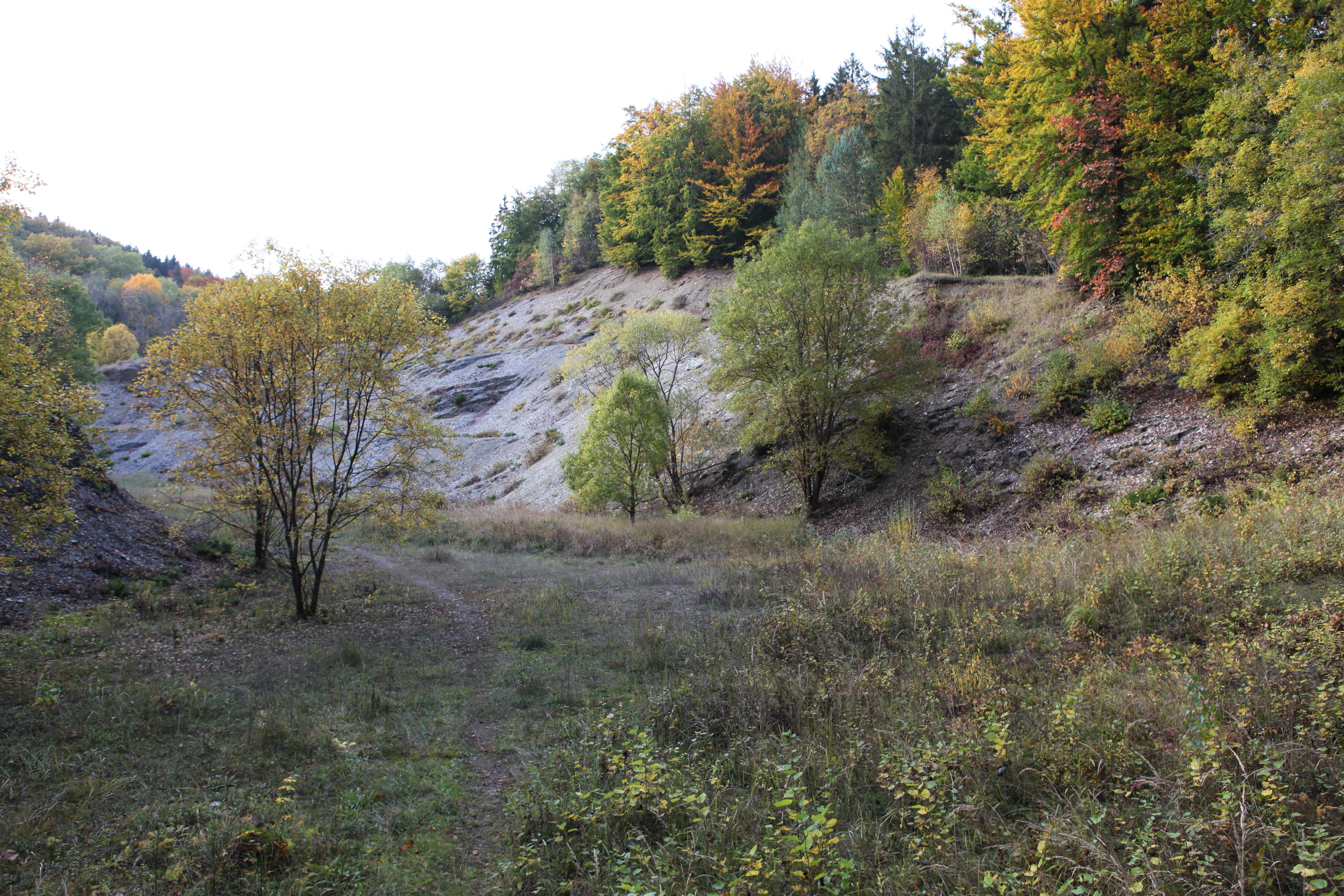 Sandgrube Taimbach